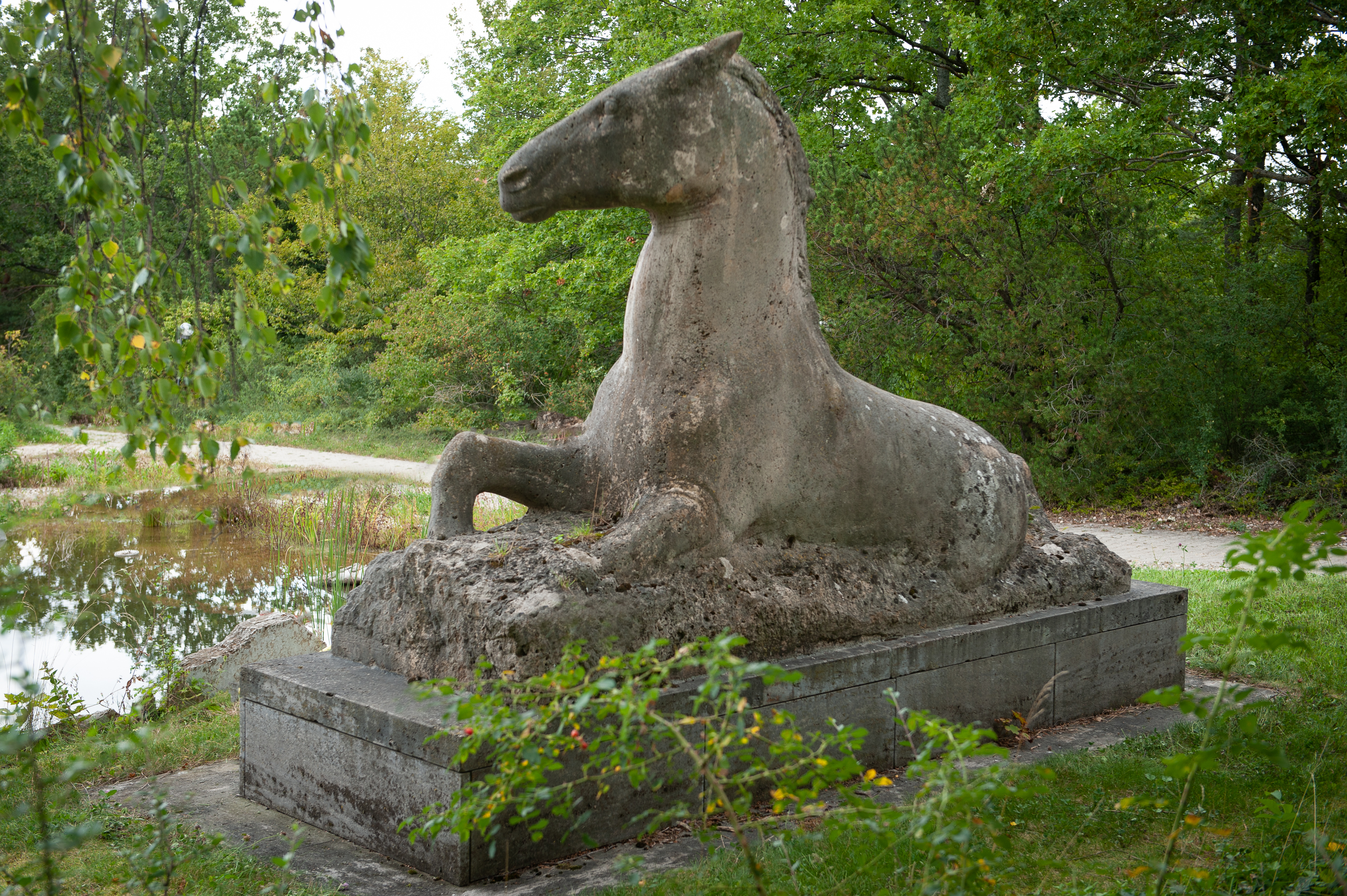 Skulptur Aufstehendes Pferd von Fritz von Graevenitz im Patientengarten des Robert-Bosch-Krankenhauses, Stuttgart